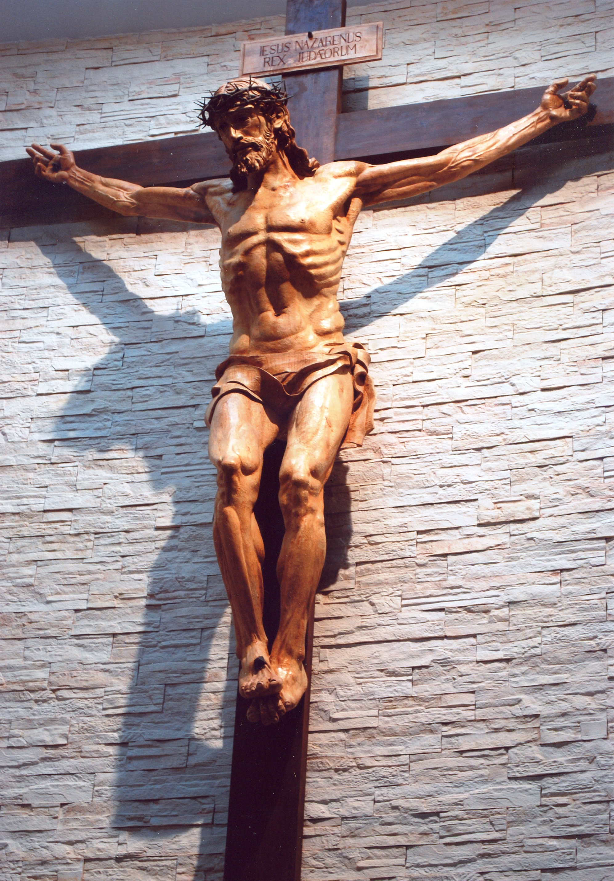 "Cristo crucificado". Autor: Rafael Pi Belda. Año: 2009. Tamaño: 2,30m de alto sobre cruz de 4,50m. Tallado en madera de abedul. Iglesia de San Luis Obispo (Valencia).